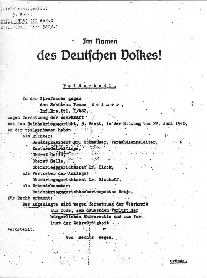 Urteil wegen Wehrkraftzersetzung vom 22. Juni 1940 gegen Franz Zeiner (Seite 1/3)